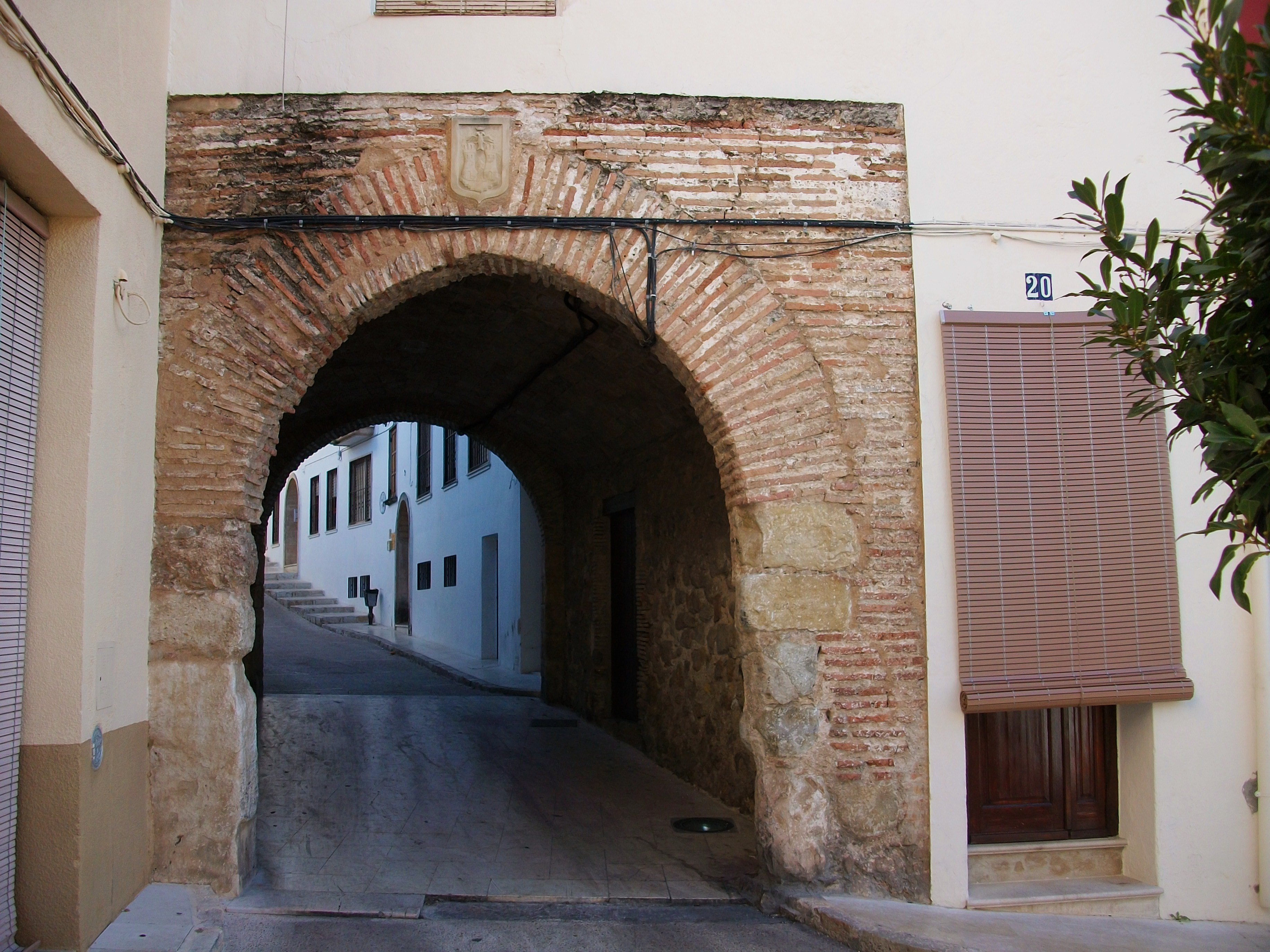 L'única entrada que queda de les muralles de la vila de Pego, Marina Alta, País Valencià.